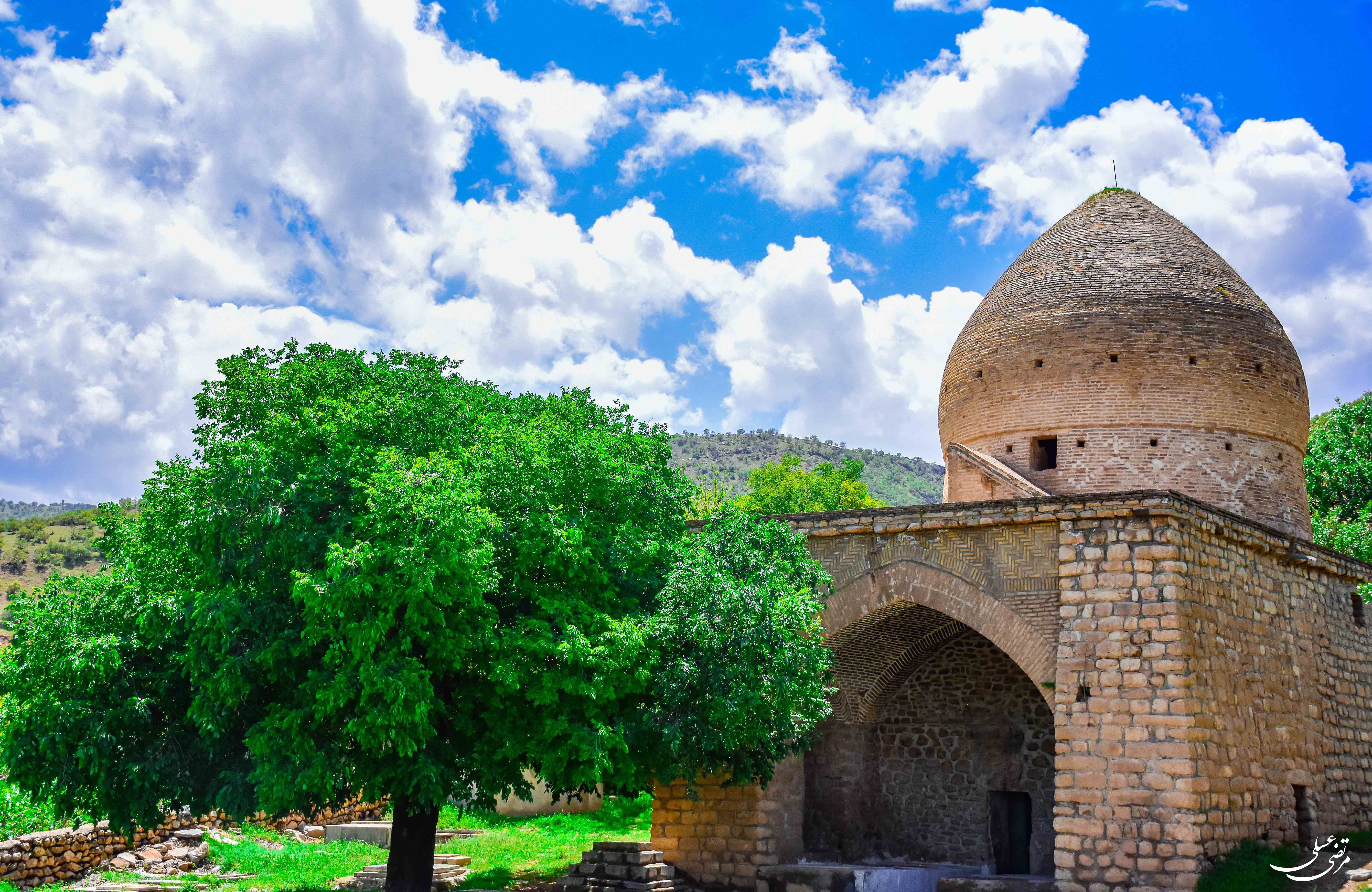 شجاع الدین خورشید